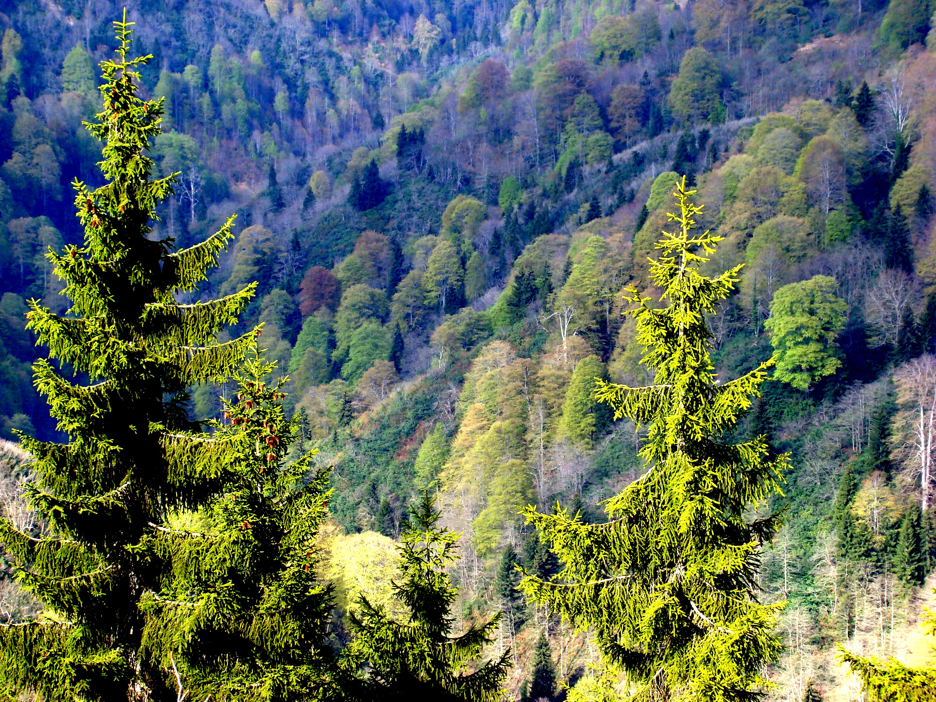 Doğu Karadeniz ve Orman